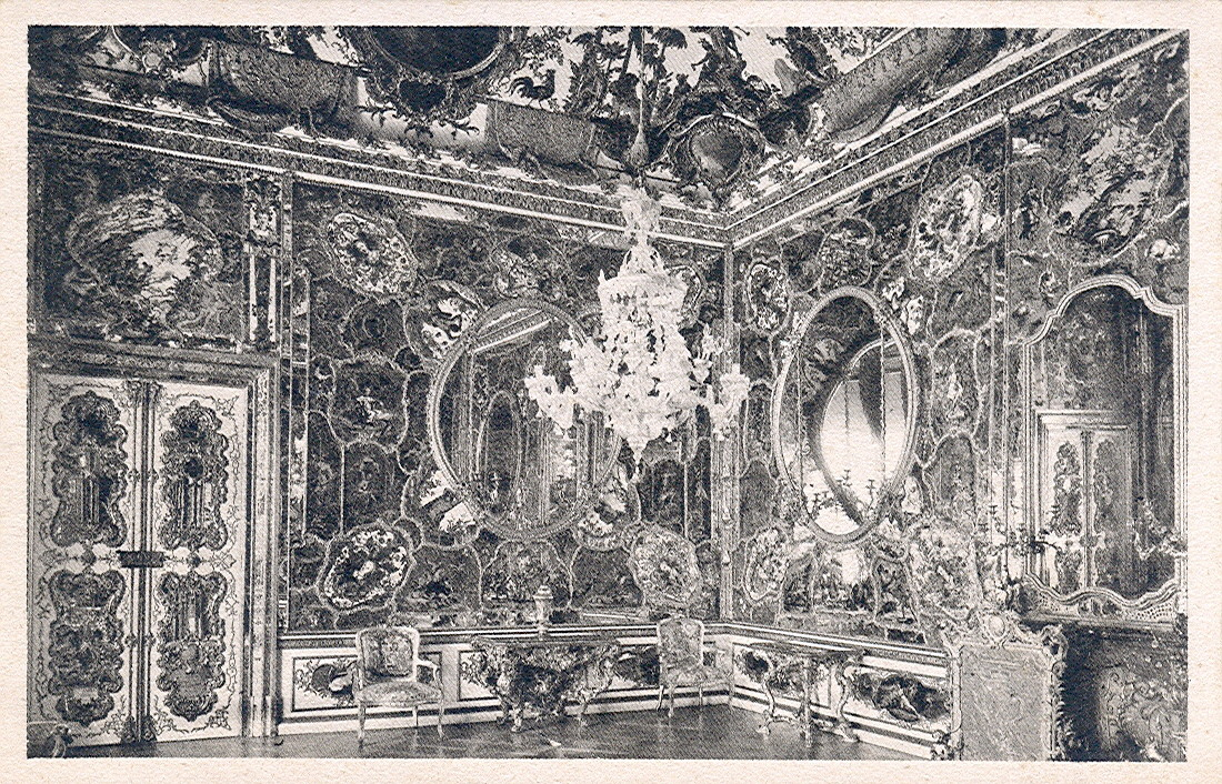 Postkarte, undatiert ( ca.1920 ). Beschriftung: "Würzburg, Residenz - Spiegelsaal".